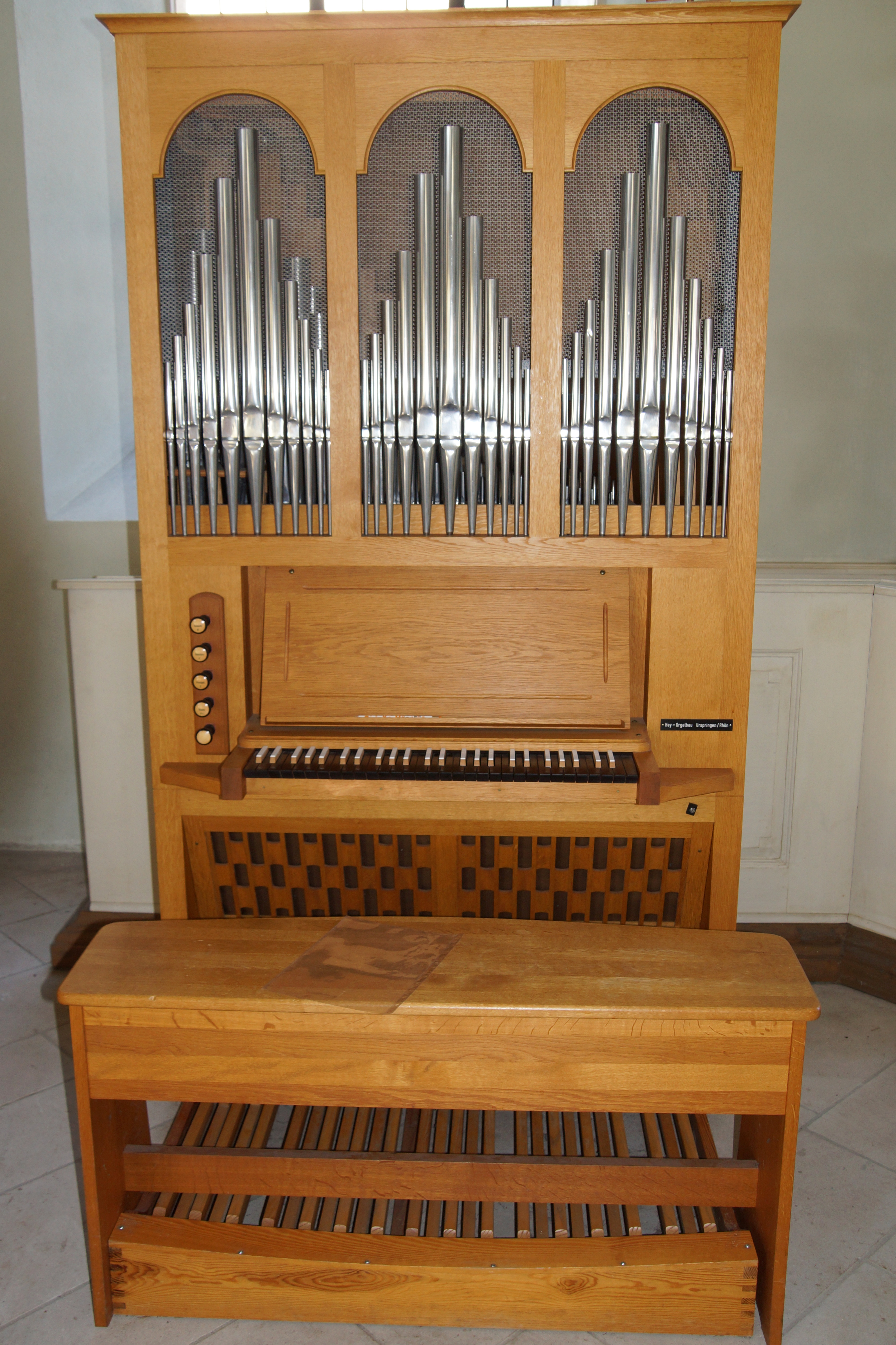 Die evangelische Dreifaltigkeitskirche in Bad Berneck im Fichtelgebirge